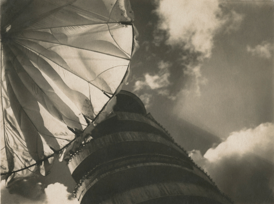 1939. Парашютная вышка. Центральный парк культуры и отдыха им. Горького, Москва